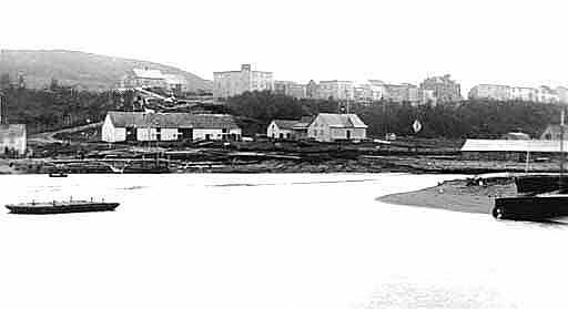 Moulin de l'estuaire de la James Richardson Company, Cap-Chat, vers 1935